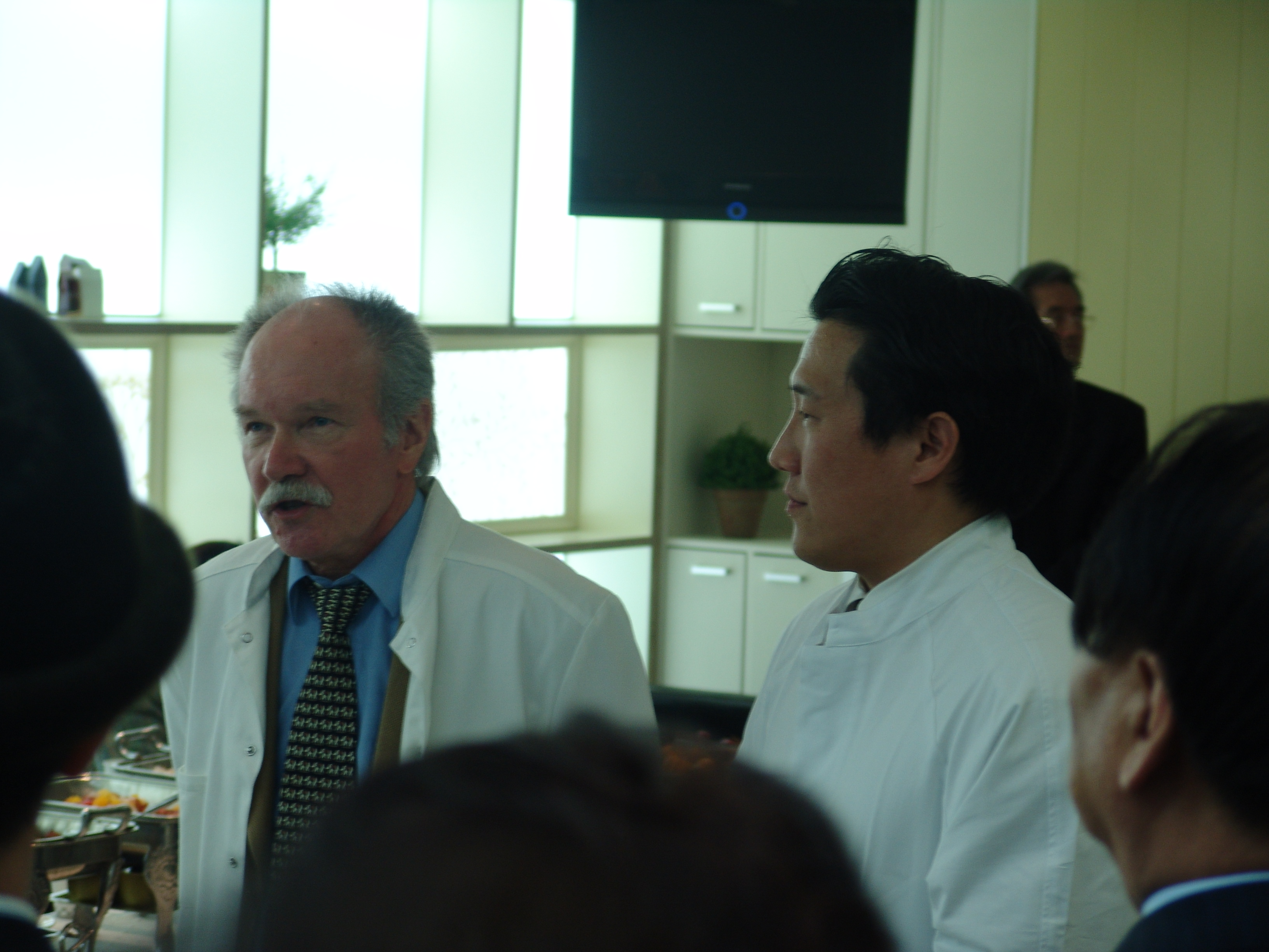 에카르트 슈뢰더 박사와 스벤 리 박사